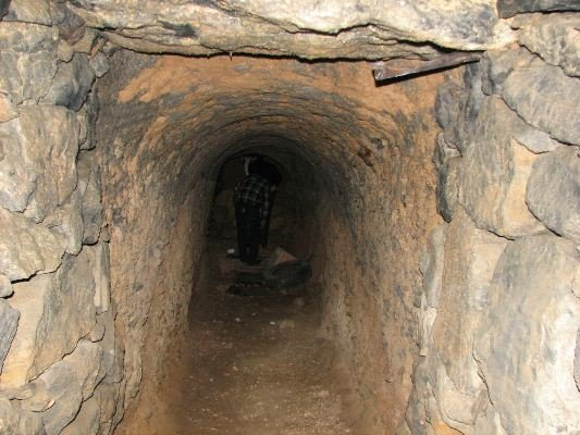 دالان ورودی به خانه زیرزمینی در شهر دوطبقه دامنه. طول دالان ورودی 30 متر با شیب که 17 متر اول آن سنگ چین شده و بدون ملات است.